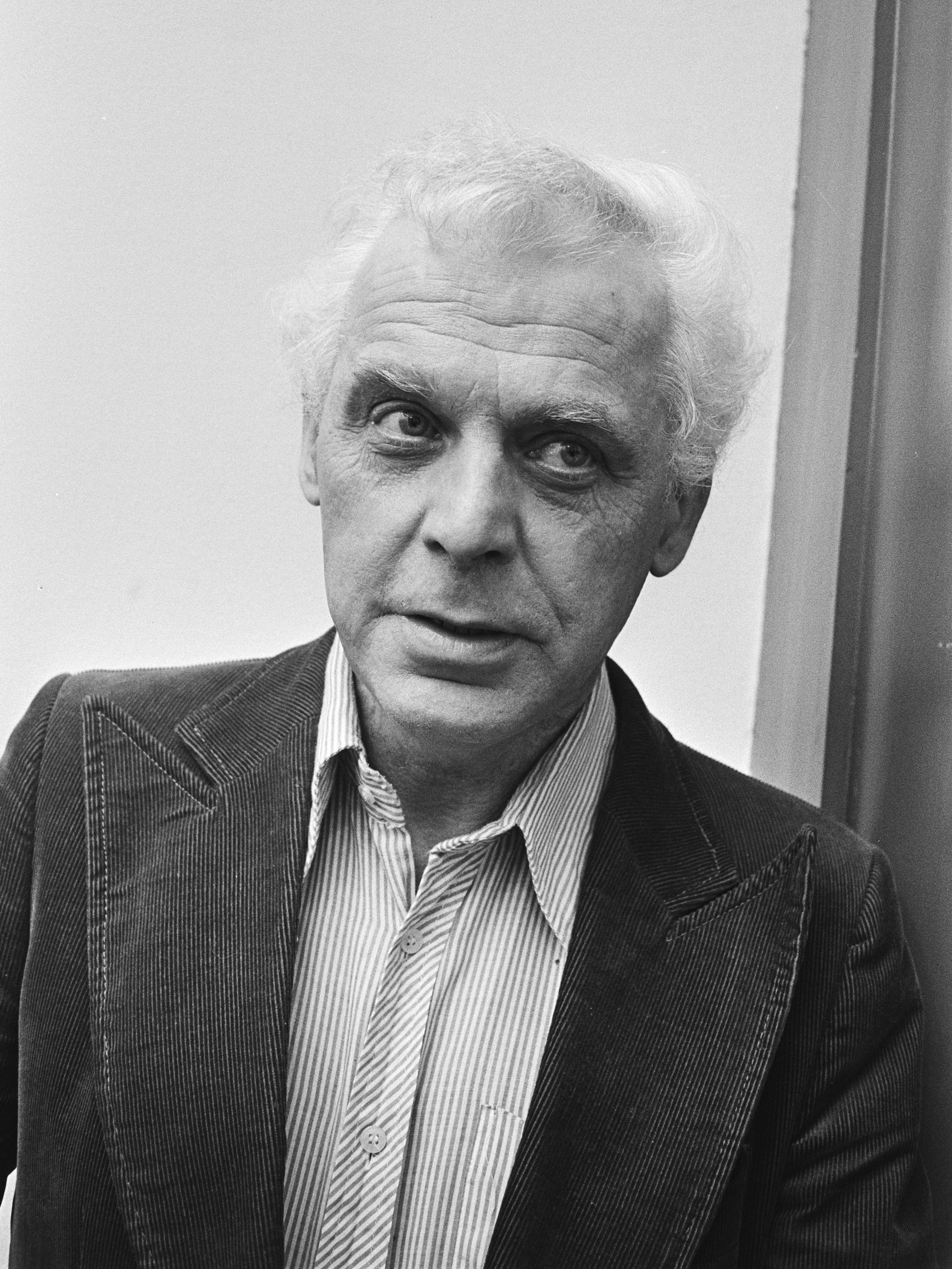 Hans Bayens bij opening tentoonstelling